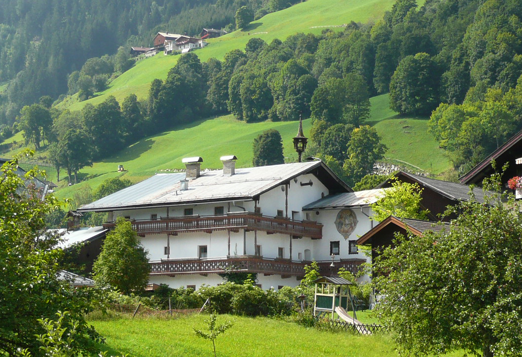 Bramberg Hof mit Freske in 2008